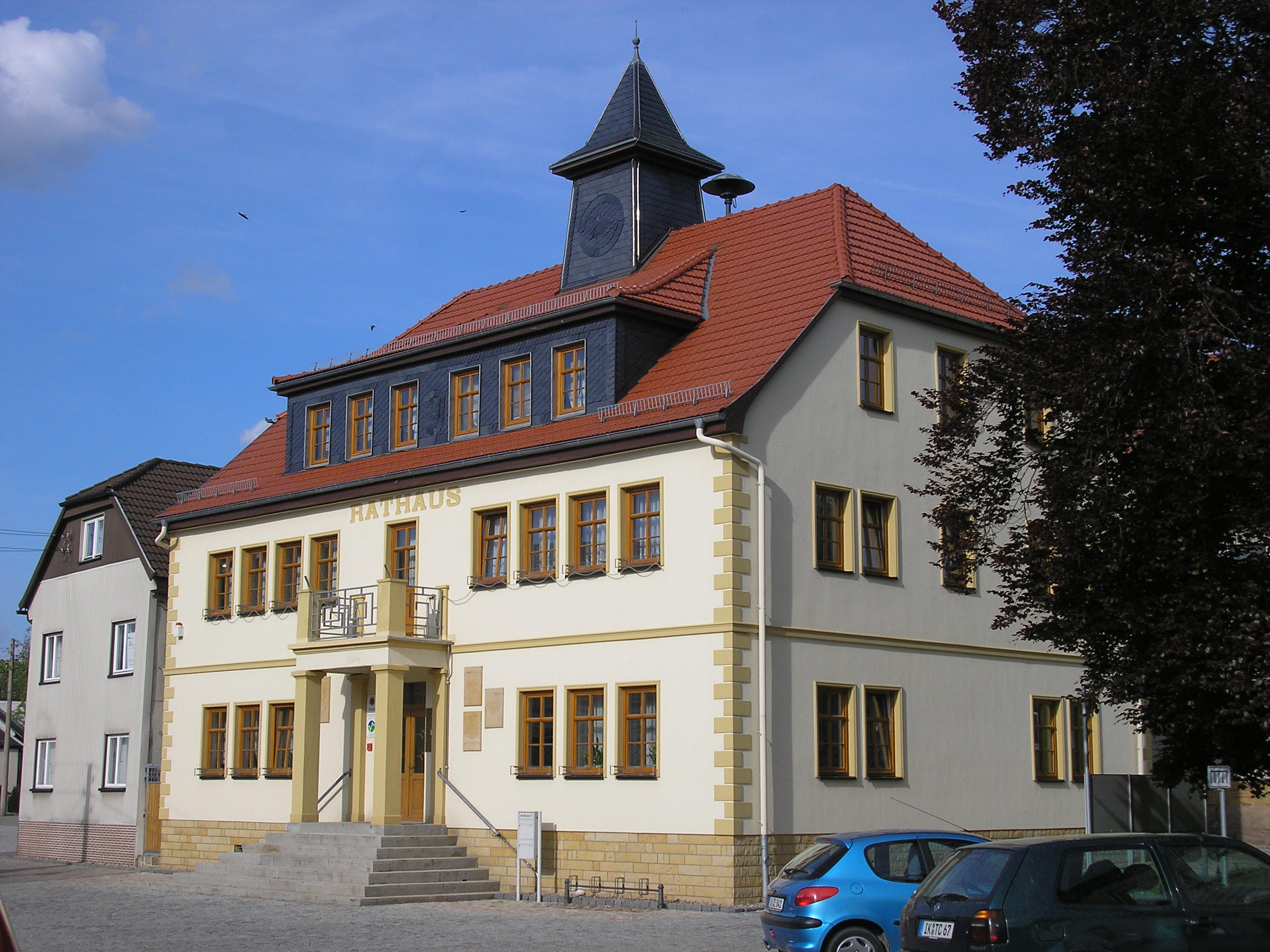 Das Rathaus der Gemeinde Wolfsberg in Gräfinau-Angstedt (Thüringen).